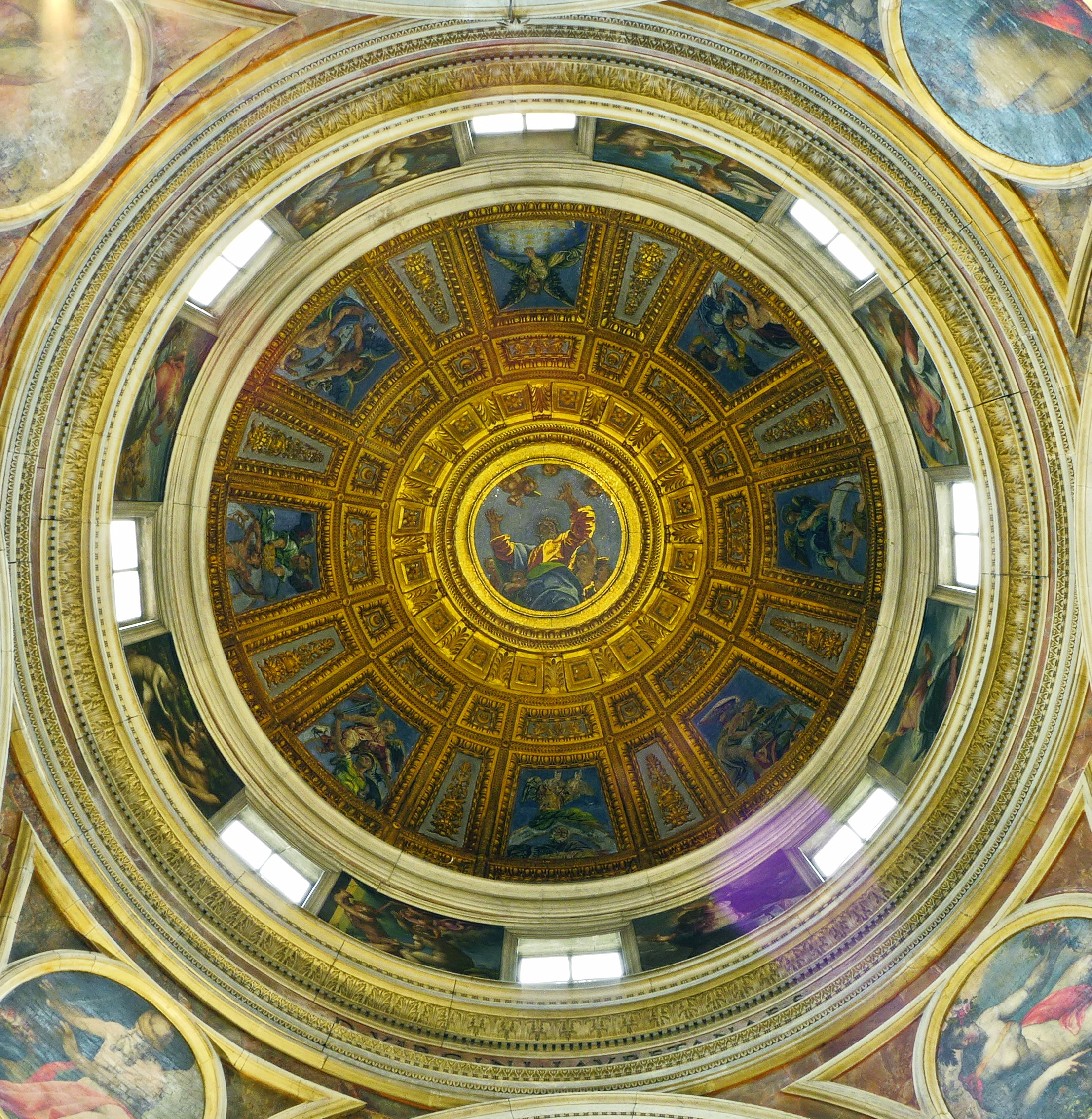 Santa Maria Del Popolo Cappella Chigi Kuppel